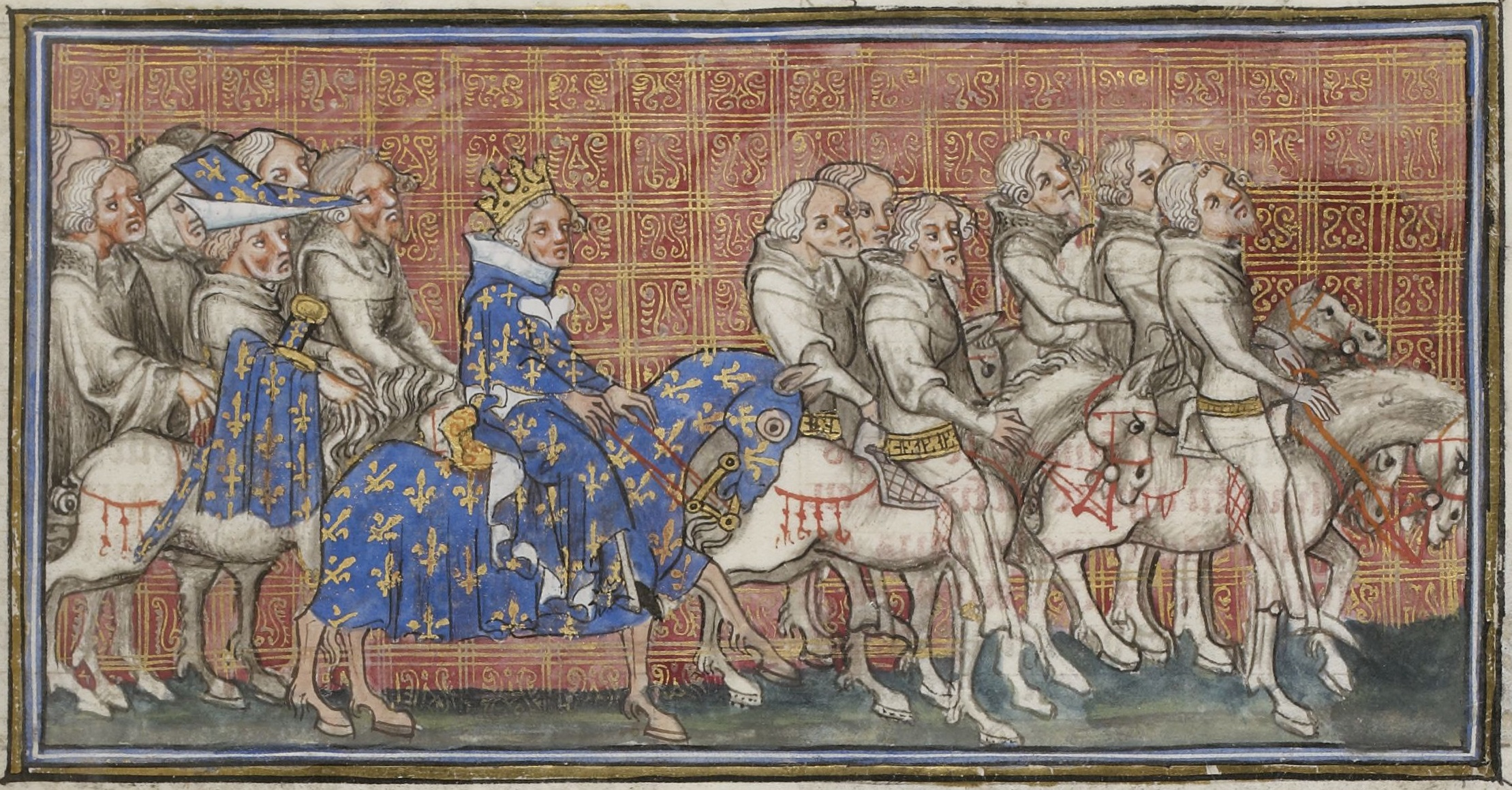 Le roi Jean le bon retourne se livrer à Édouard III. Grandes chroniques de France de Charles V, Bibliothèque Nationale de France, Ms. Français 2813, folio 438 recto, Paris, XIVe siècle.